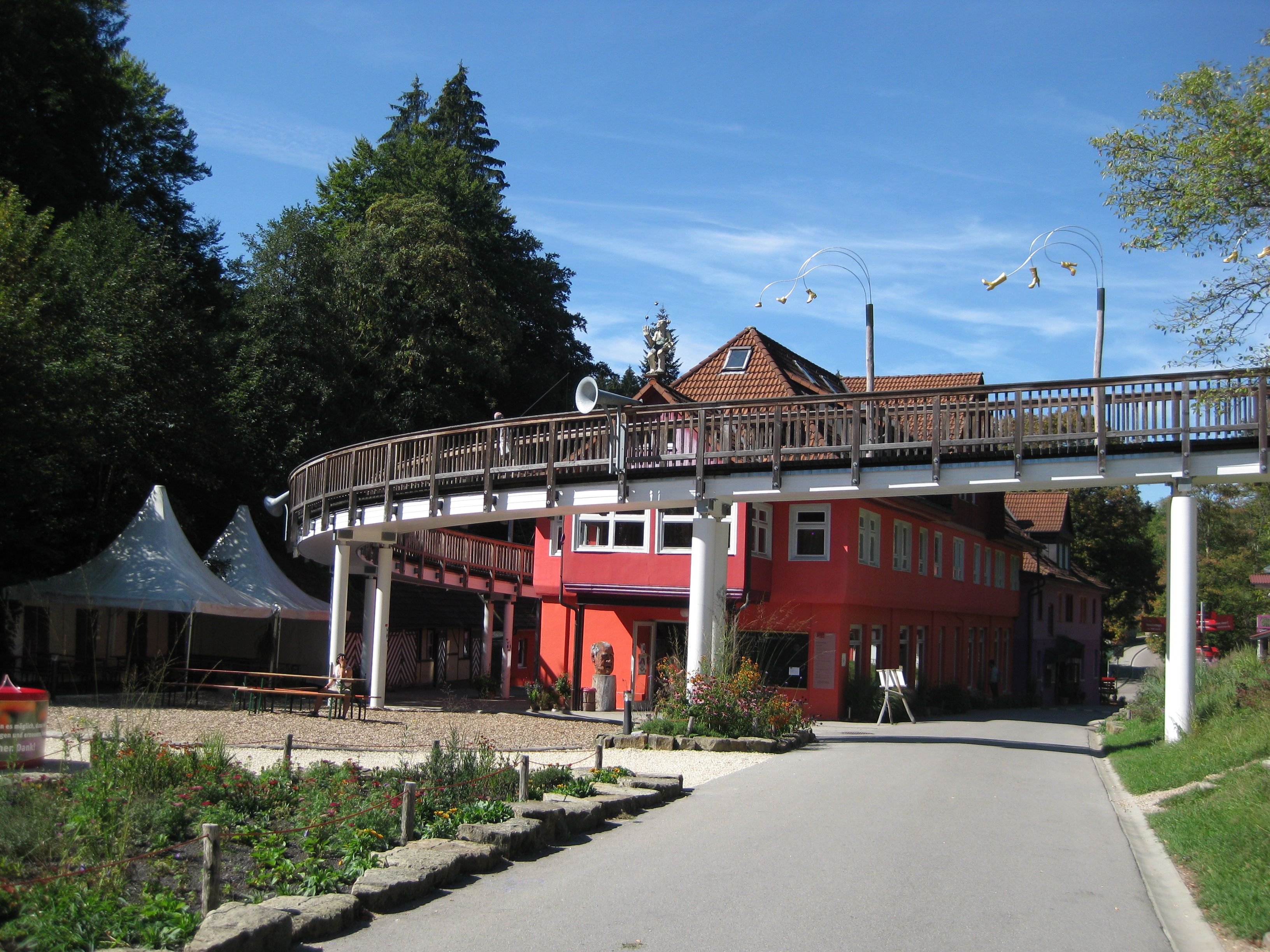 Erfahrungsfeld der Sinne Eins+Alles, ein Freizeit- und Erlebnispark im Welzheimer Wald